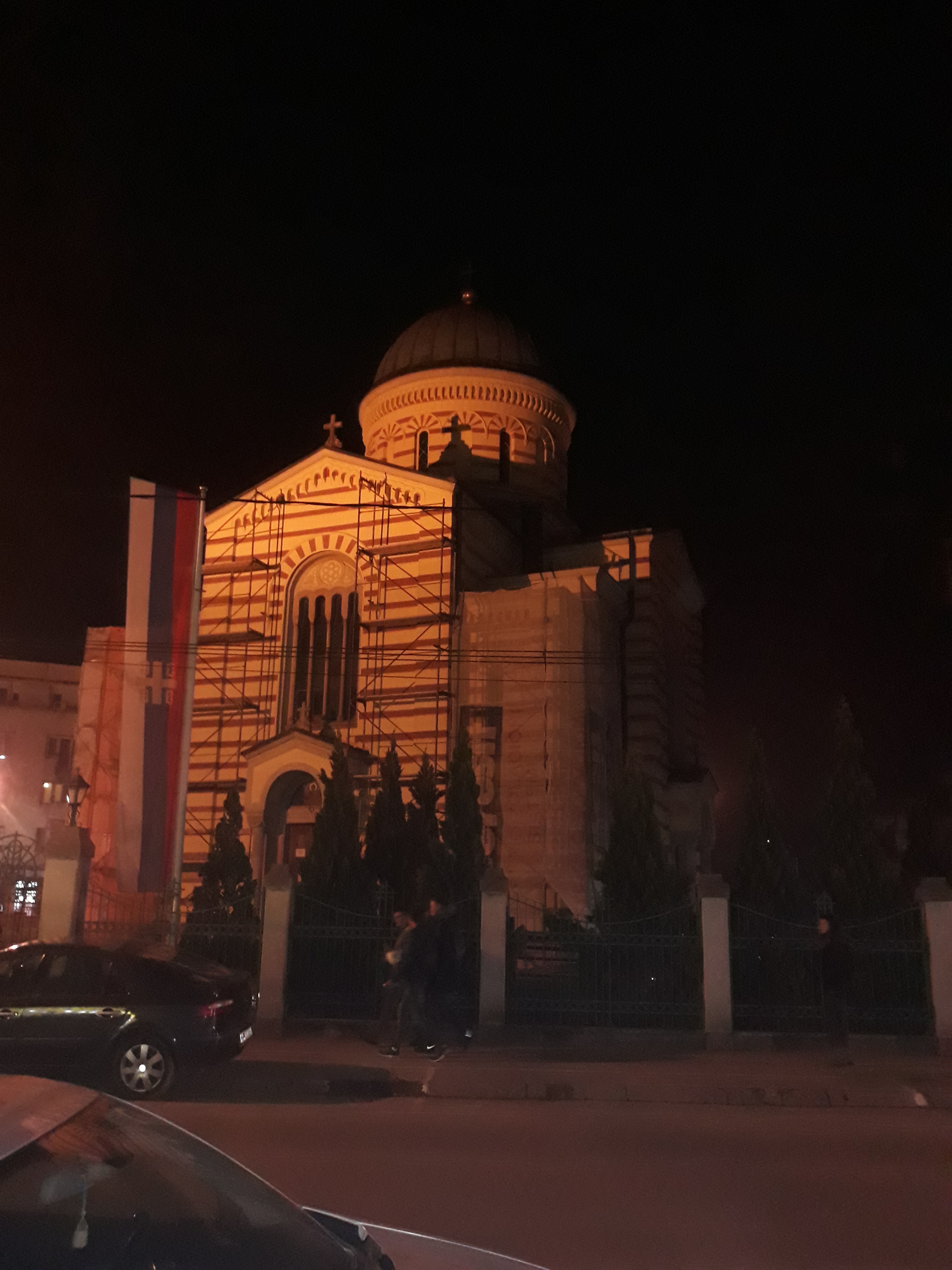 Саборна црква рождества Пресвете Богородице у Крушевцу